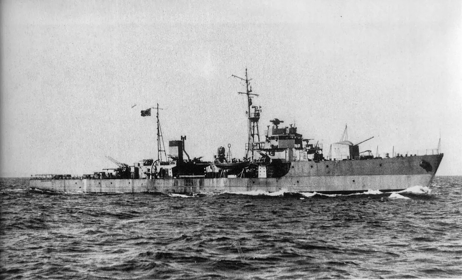 日本海軍 鵜来型海防艦「奄美」、横浜沖